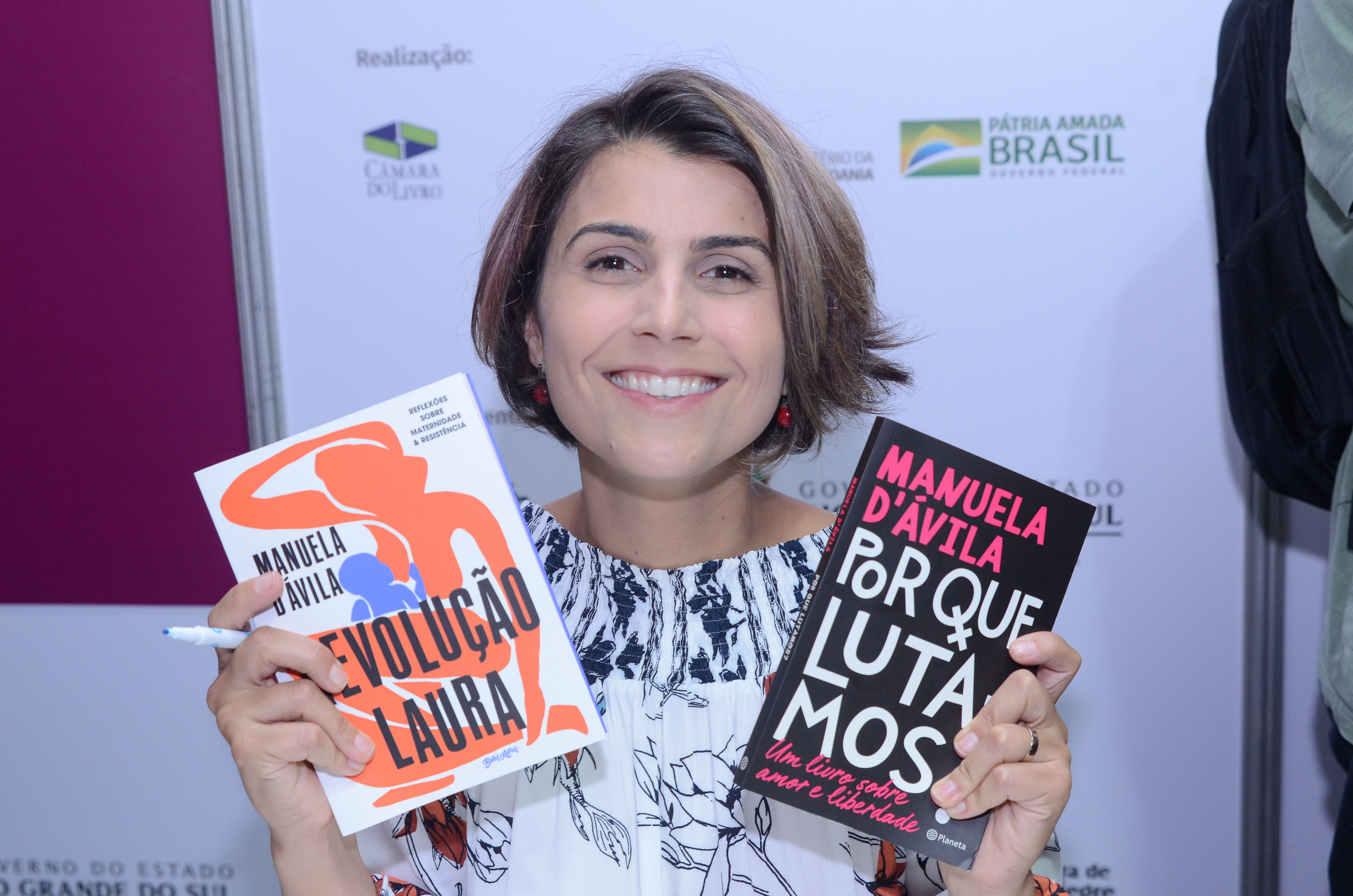 Manuela d'Ávila lança seu livro